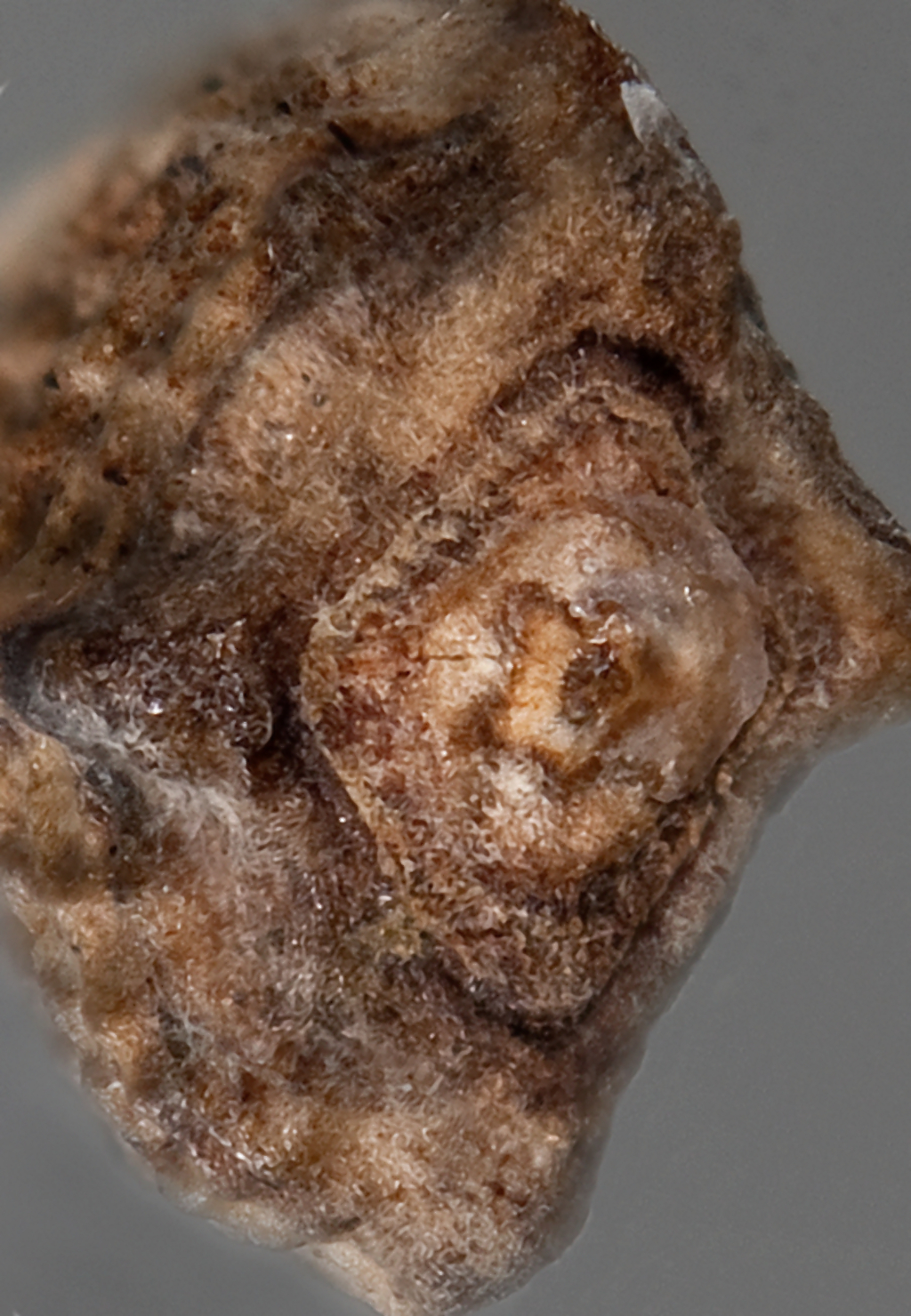 Onopordum illyricum - (Cardo borriquero, toba) - Cipsela suelta desprovista de su vilano, con placa apical cuadrangular y nectario pentalobulado.